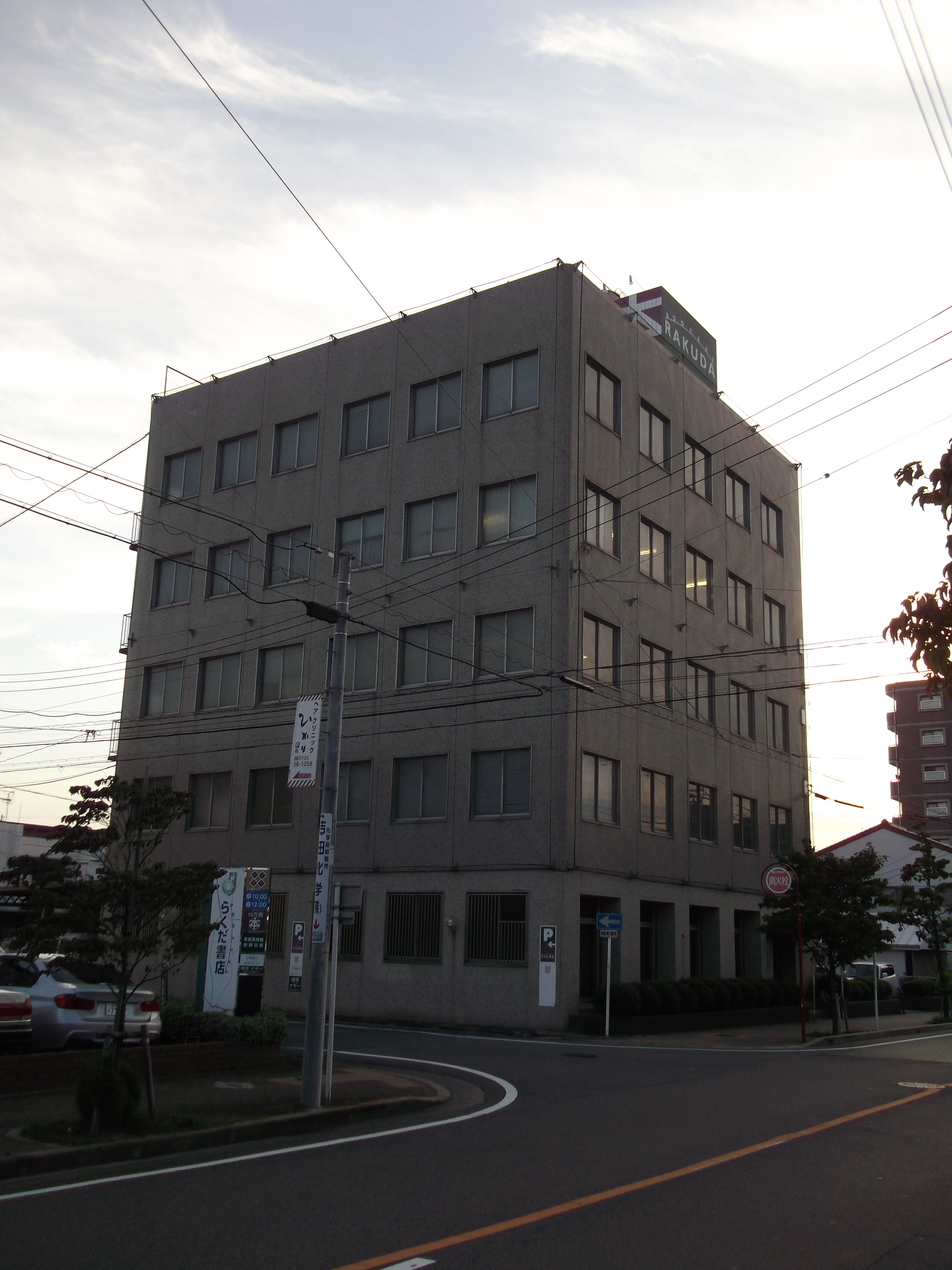 名古屋市千種区青柳町のセントラルスペーシャルテクノロジー本社を北側公道東側より撮影